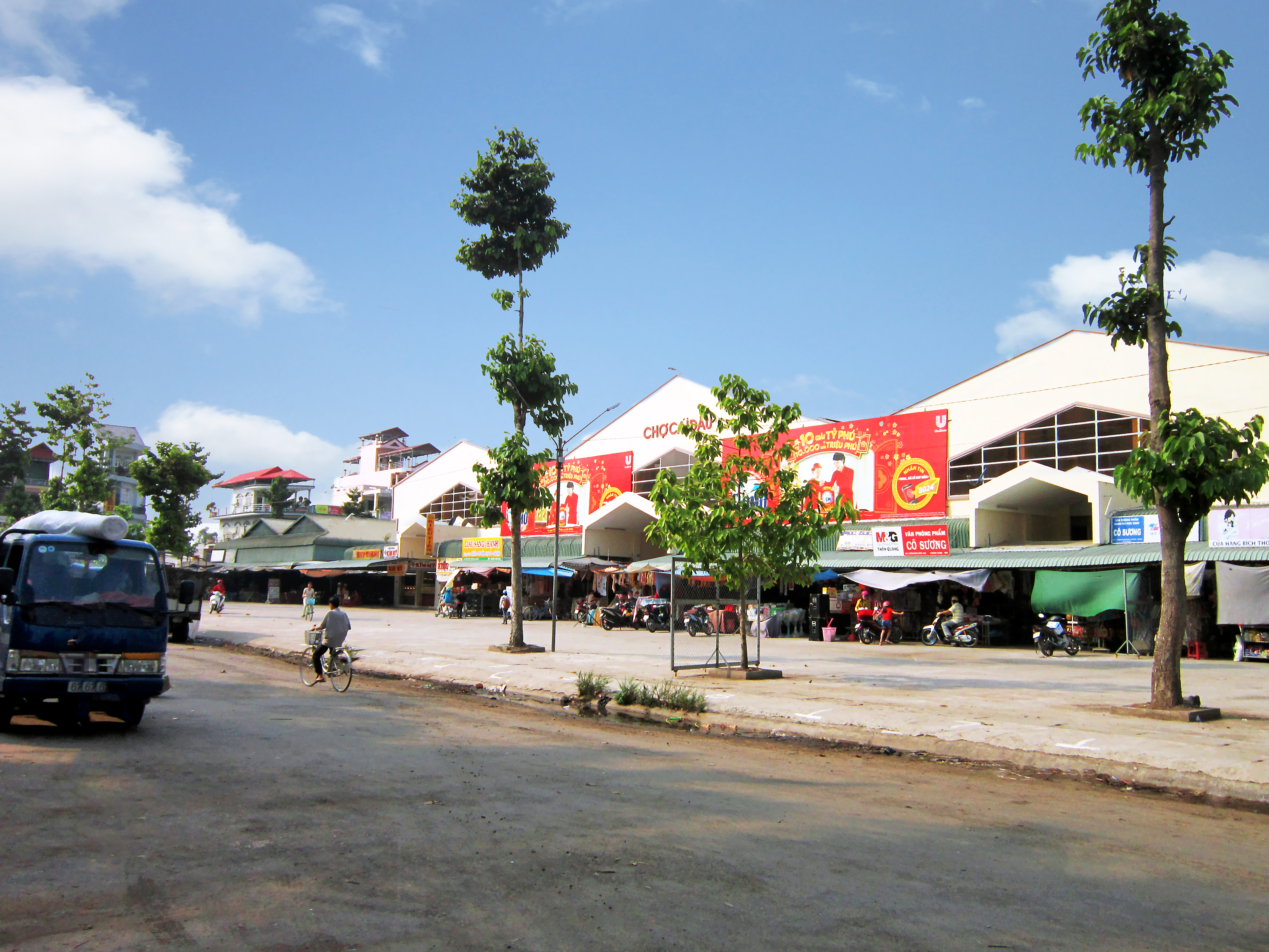 Chợ thị trấn Cái Dầu, là chợ lớn nhất huyện Châu Phú, tỉnh An Giang, Việt Nam.